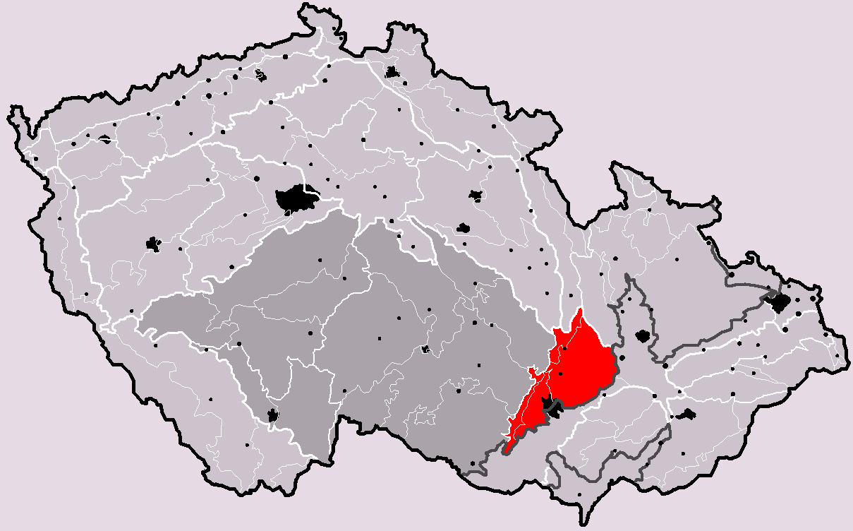 Poloha geomorfologické oblasti Brněnská vrchovina v rámci České republiky. Hercynský systém Hercynská pohoří I Česká vysočina I2 (II) Česko-moravská subprovincie I2D (IID) Brněnská vrchovina